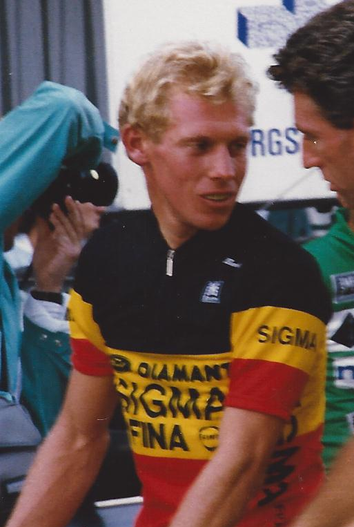 ETIENNE DEWILDE et SEAN KELLY